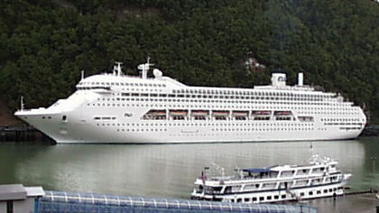 PIC00056